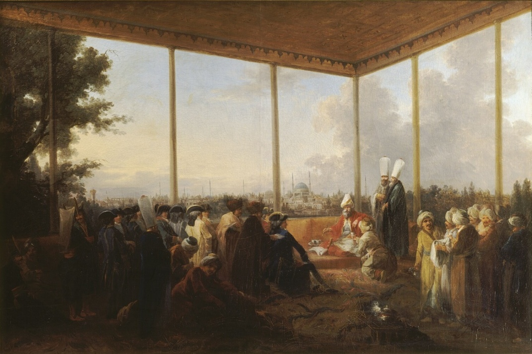 Audience accordée par le grand vizir Aïmoli-Carac au comte de Saint-Priest (ambassadeur de France), 18 mars 1779.